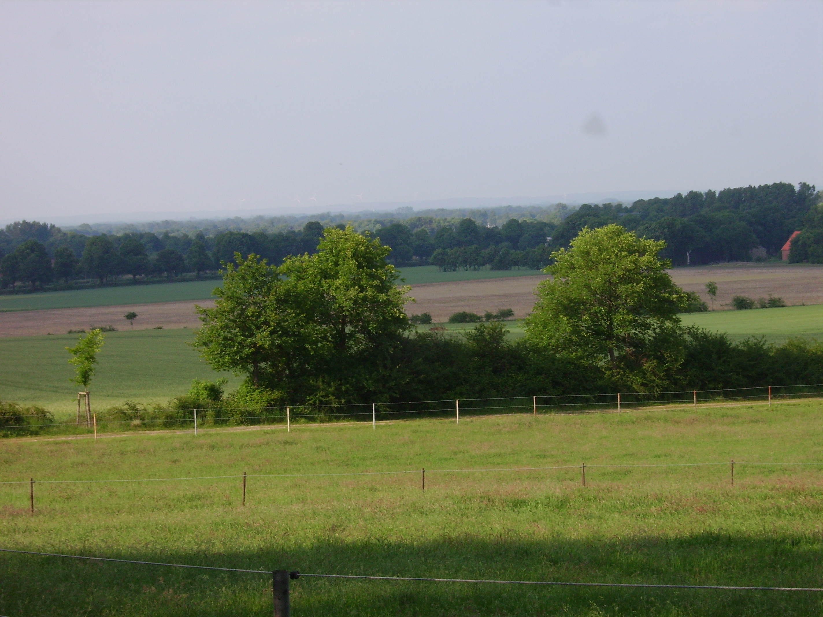 Am Kälberberg in Recke-Obersteinbeck, Kreis Steinfurt, Nordrhein-Westfalen, Deutschland.